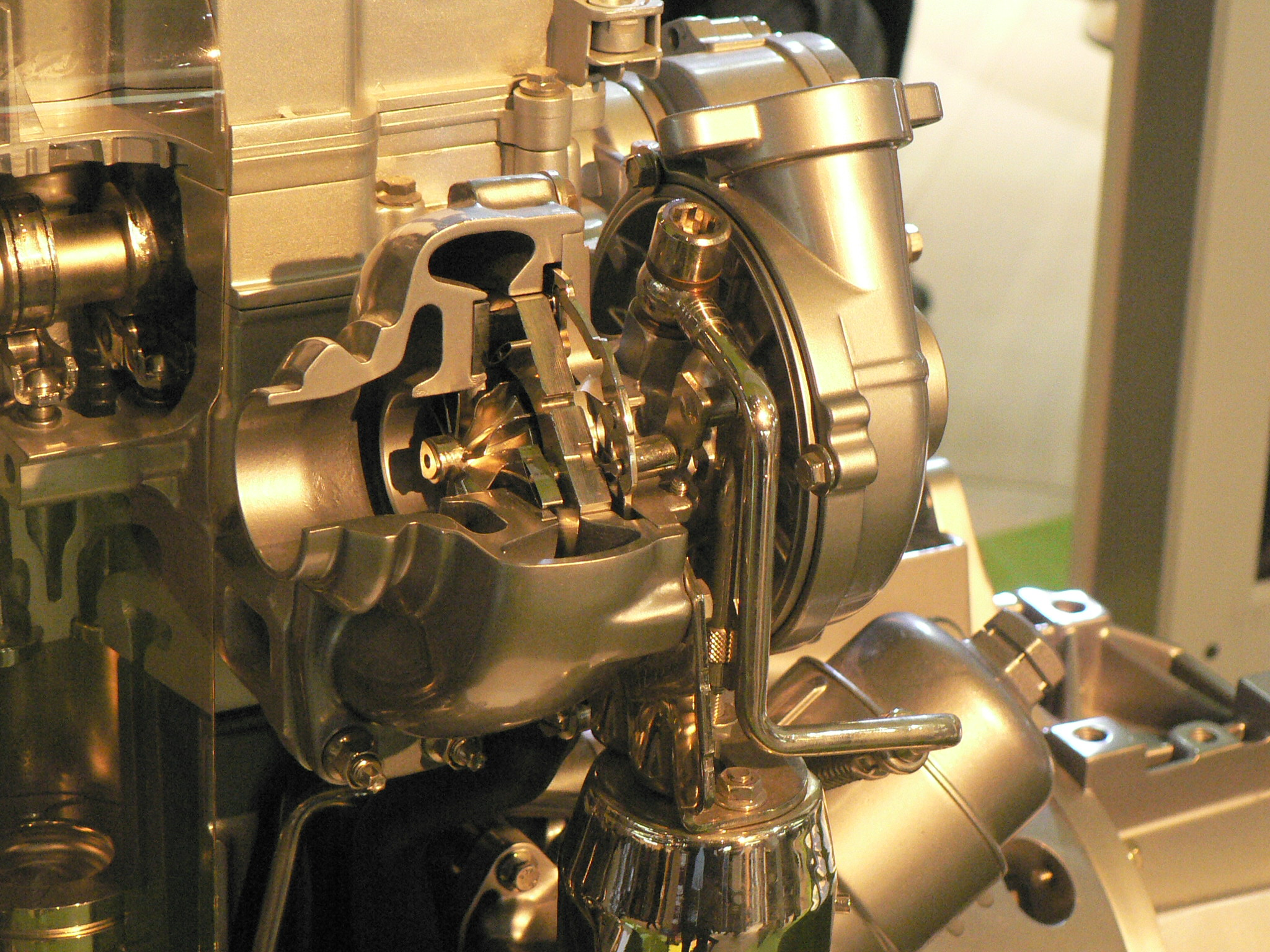 Mondial de l'automobile, Paris 2006